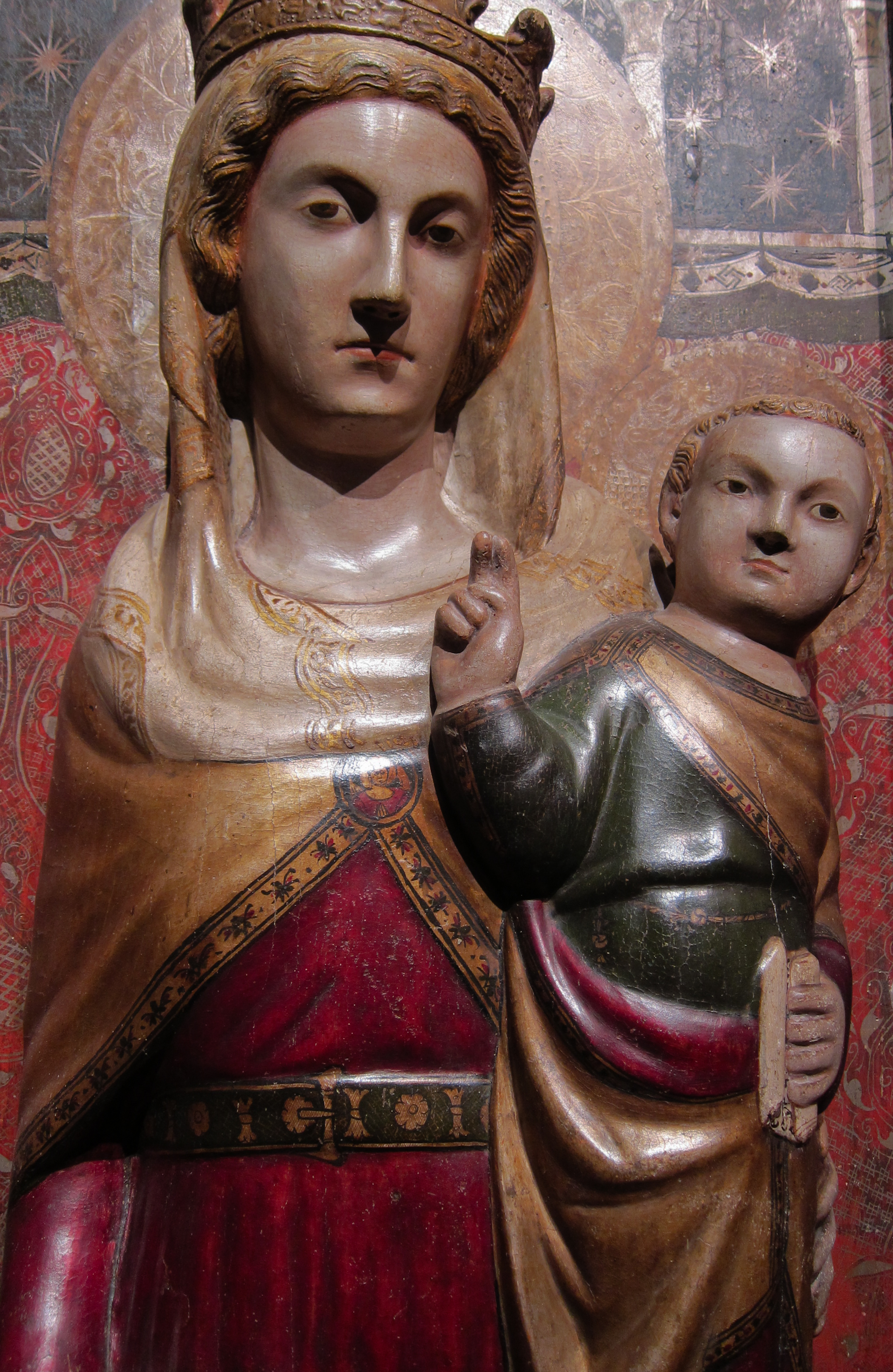 detail